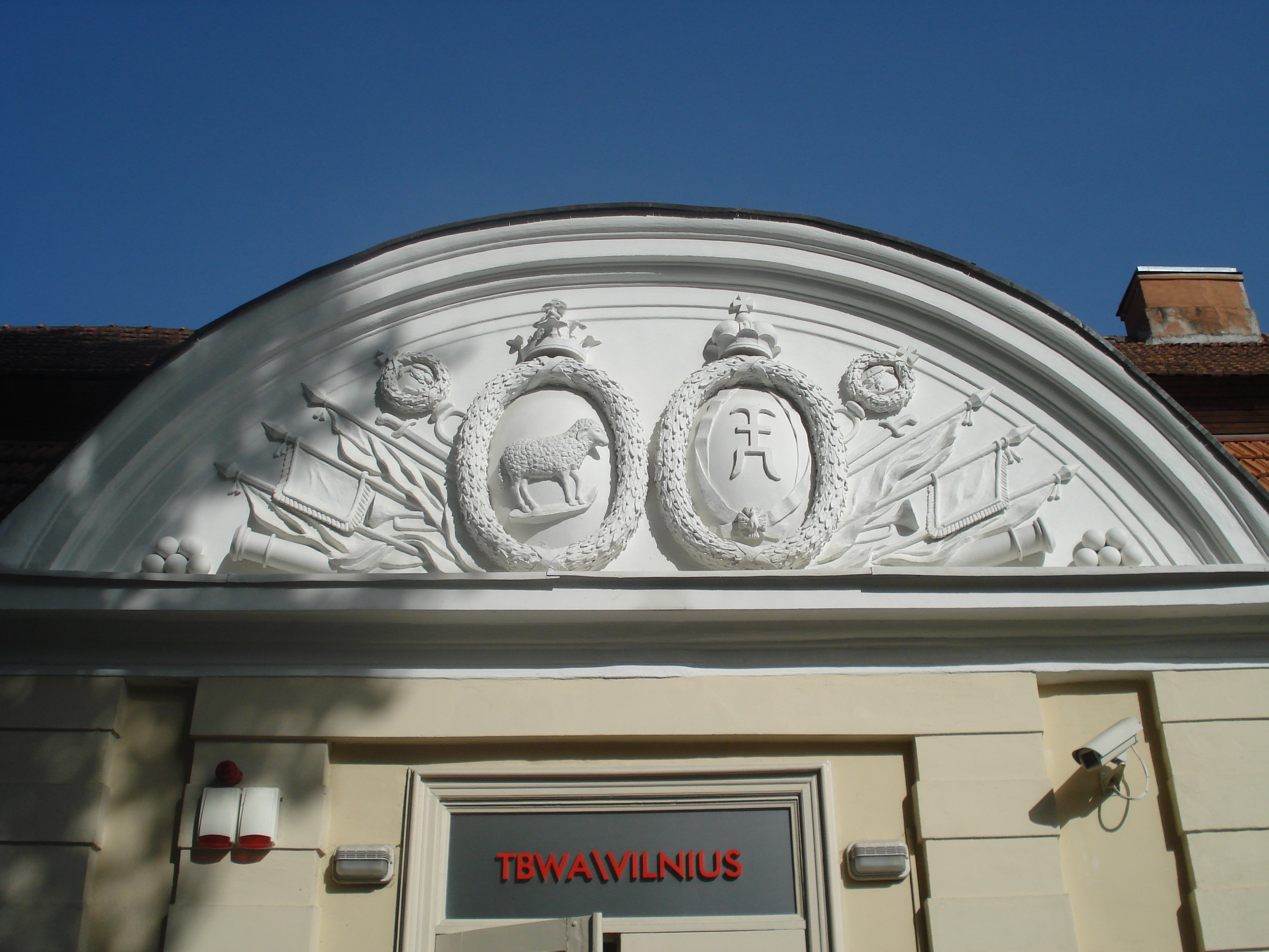 Фронтон с рельефной композицией из знамён и картуша с гербами владельцев. Репрезентативное здание ансамбля помещичьей резиденции позднего барокко с чертами рококо. Тилто 1, ВильнюсLietuvių: Frontonas su herbais. Dvarininko rezidencijos reprezentacinis pastatas. Tilto g. 1 / T. Vrublevskio g. 2, Vilnius